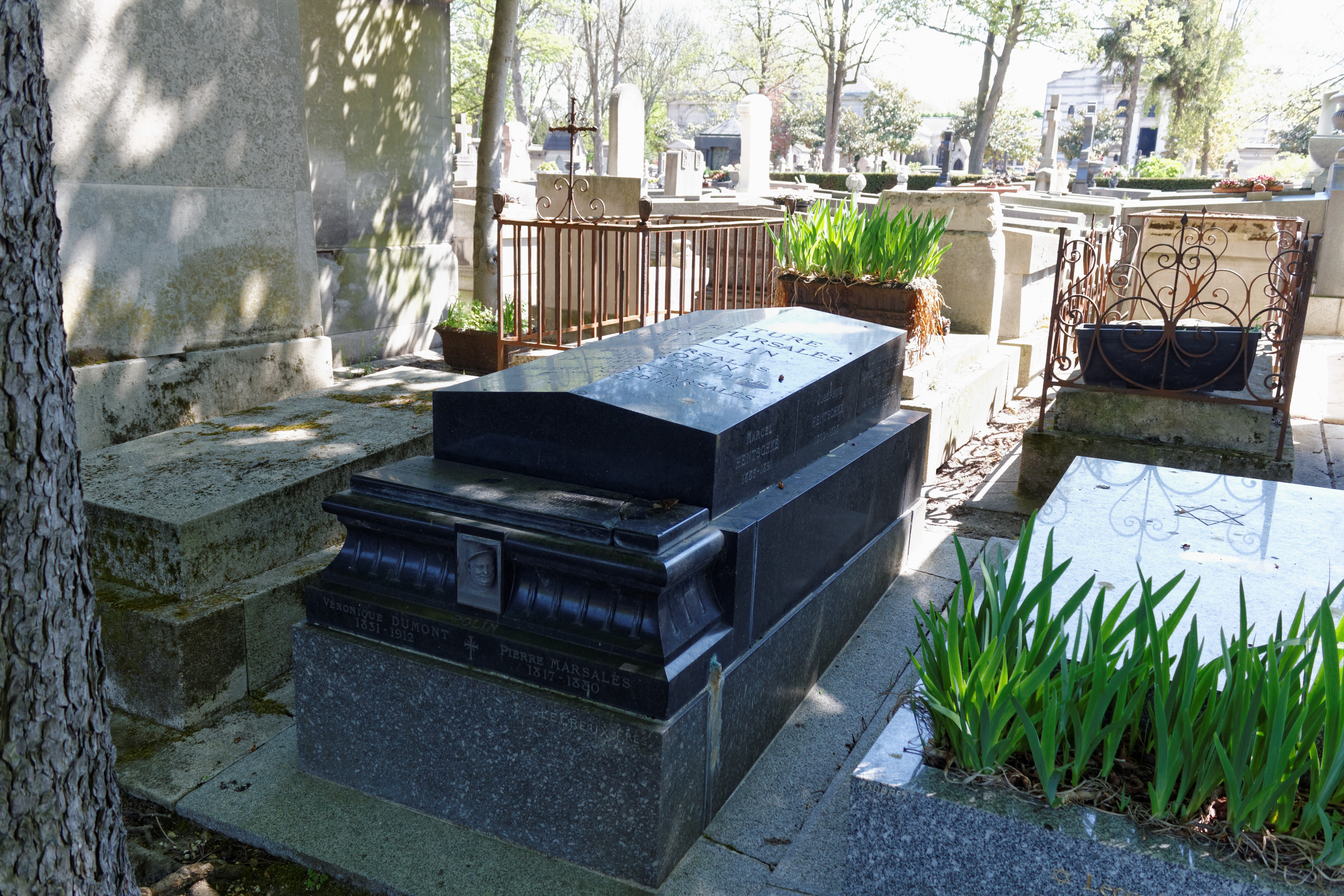 Vue d'ensemble